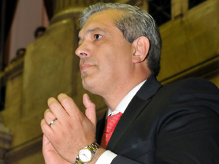 Diputado Julian Dominguez